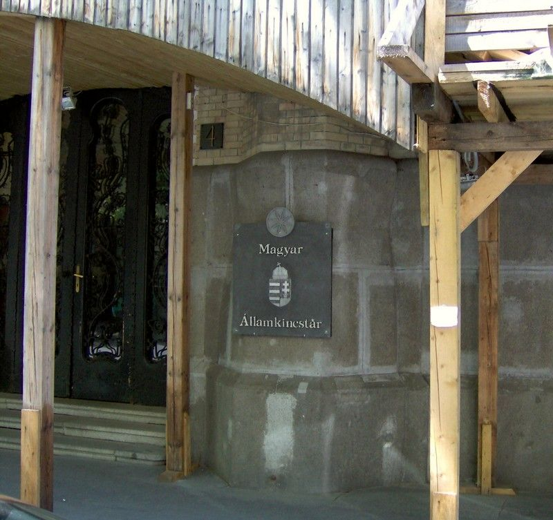 Magyar Államkincstár épületének bejárata, Budapest V. (Hold utca 4.)